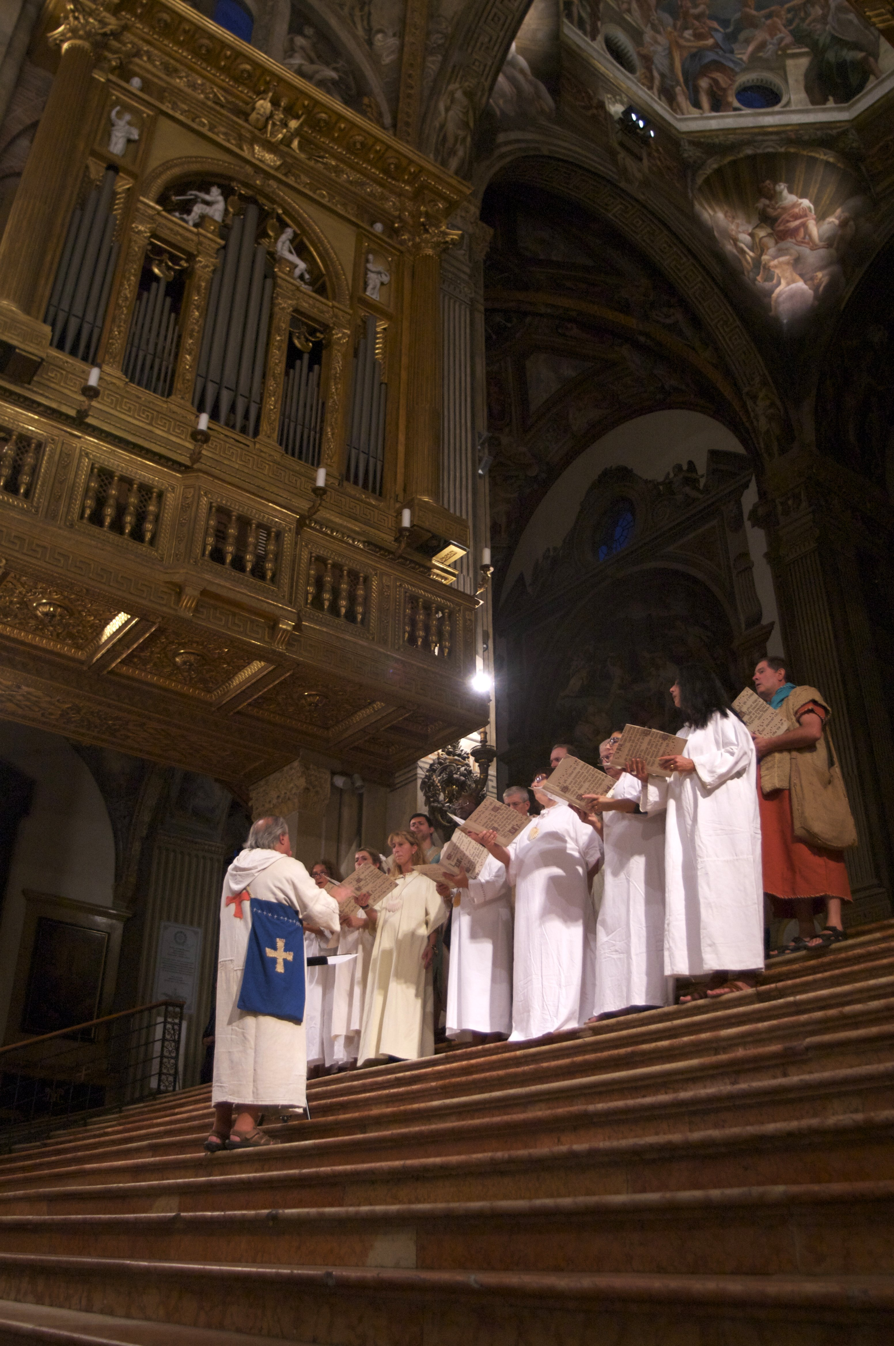 Coro in abiti medievali durante la benedizione del Palio di Parma in duomo